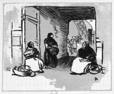 Marchandes au panier, rue Montorgueil. Gravure par Auguste Lepère (1849-1918) . Gravure.